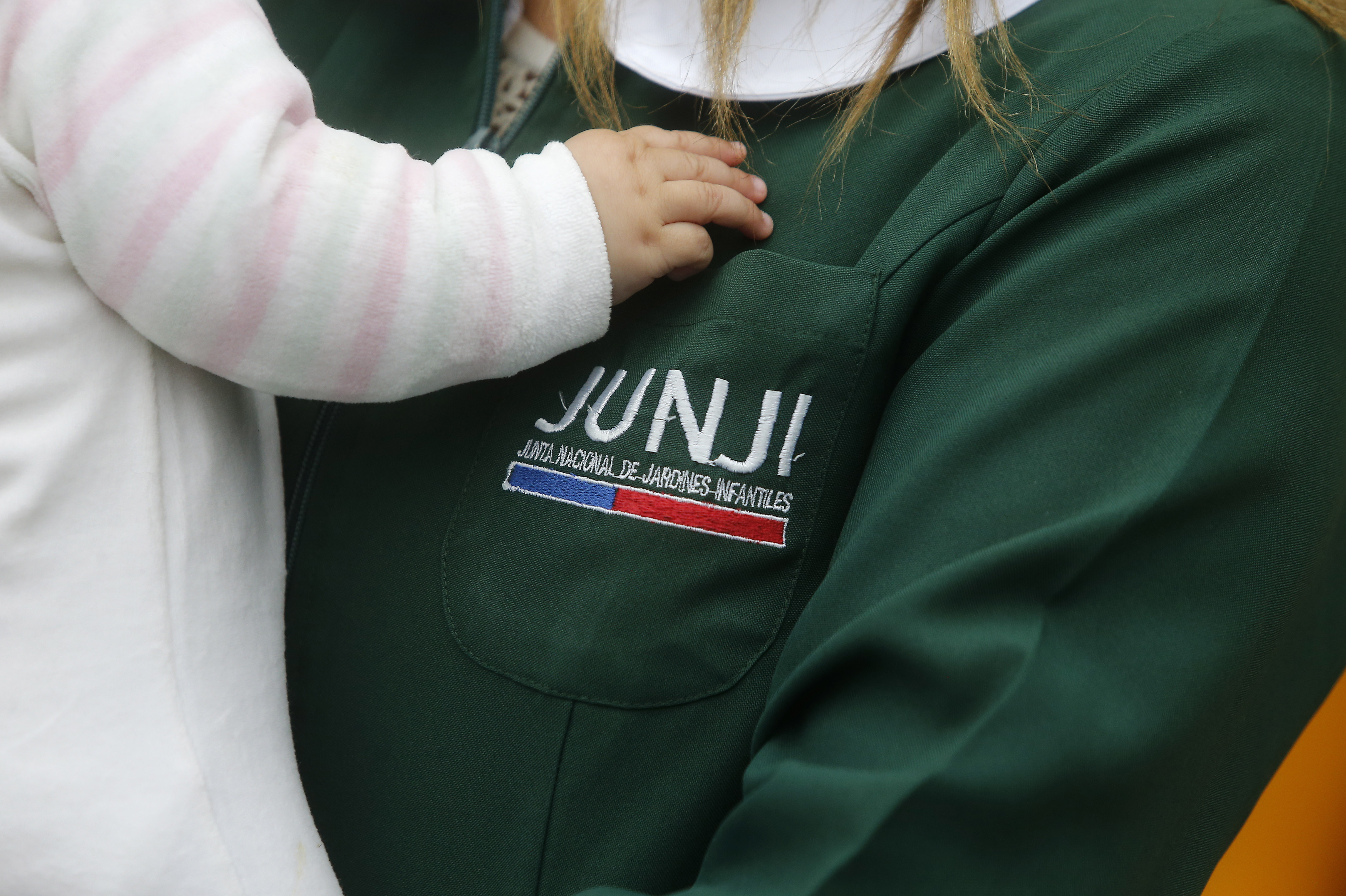 La Serena, 27 de septiembre de 2018 Inauguracion de Jardin Infantil Ricitos de Oro. Paul Plaza/Segegob